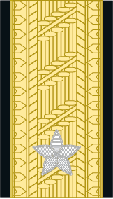 Brigader